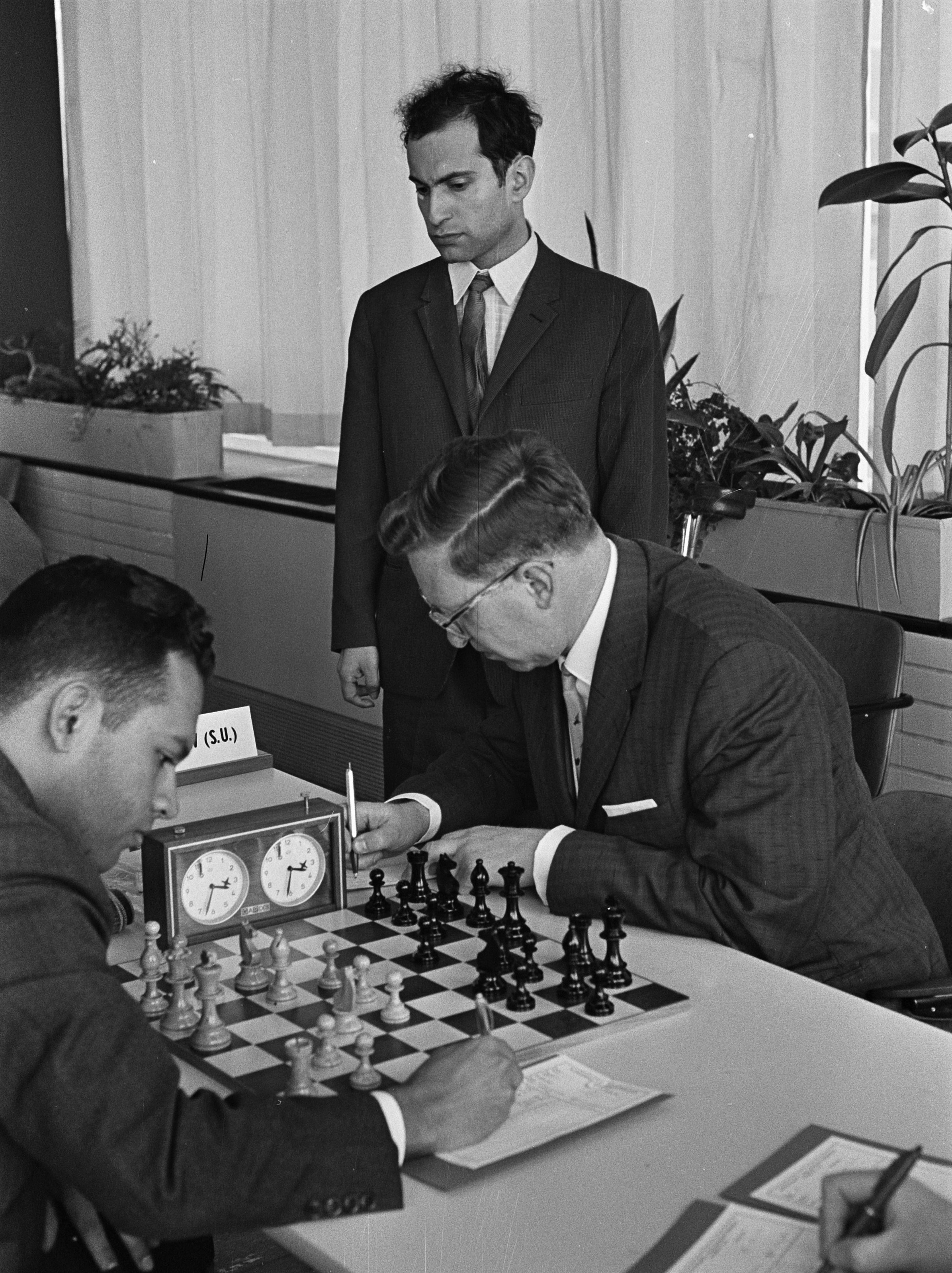 Collectie / Archief : Fotocollectie Anefo Reportage / Serie : [ onbekend ] Beschrijving : Interzonaal schaaktoernooi begonnen, nr. 11, 12, 13 Quinones (Peru) tegen Smyslow (SU). Staand Mikhail Tal. Datum : 20 mei 1964 Trefwoorden : SCHAAKTOURNOOIEN Fotograaf : Pot, Harry / Anefo Auteursrechthebbende : Nationaal Archief Materiaalsoort : Negatief (zwart/wit) Nummer archiefinventaris : bekijk toegang 2.24.01.05 Bestanddeelnummer : 916-4529